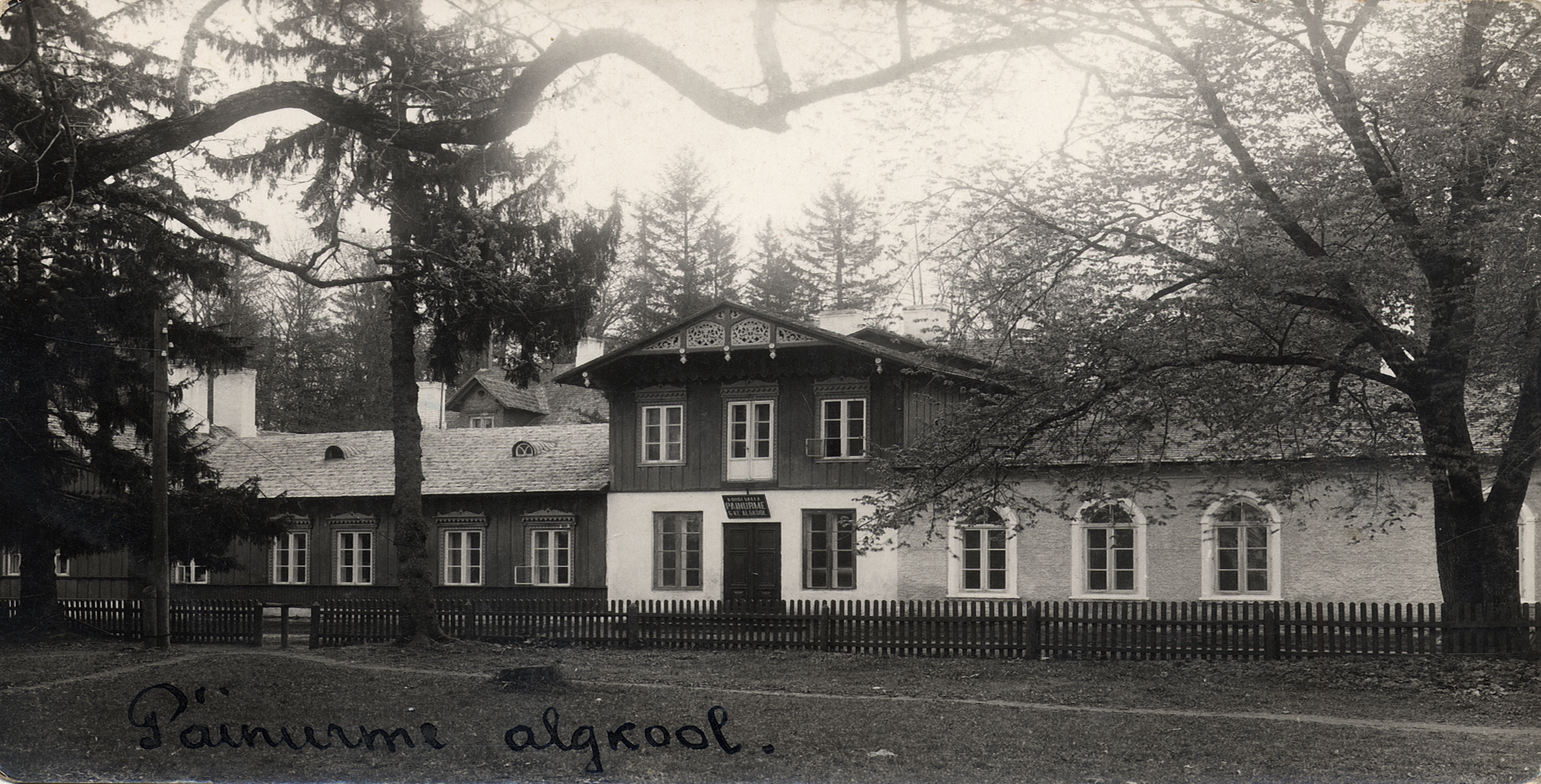 Päinurme algkooli maja